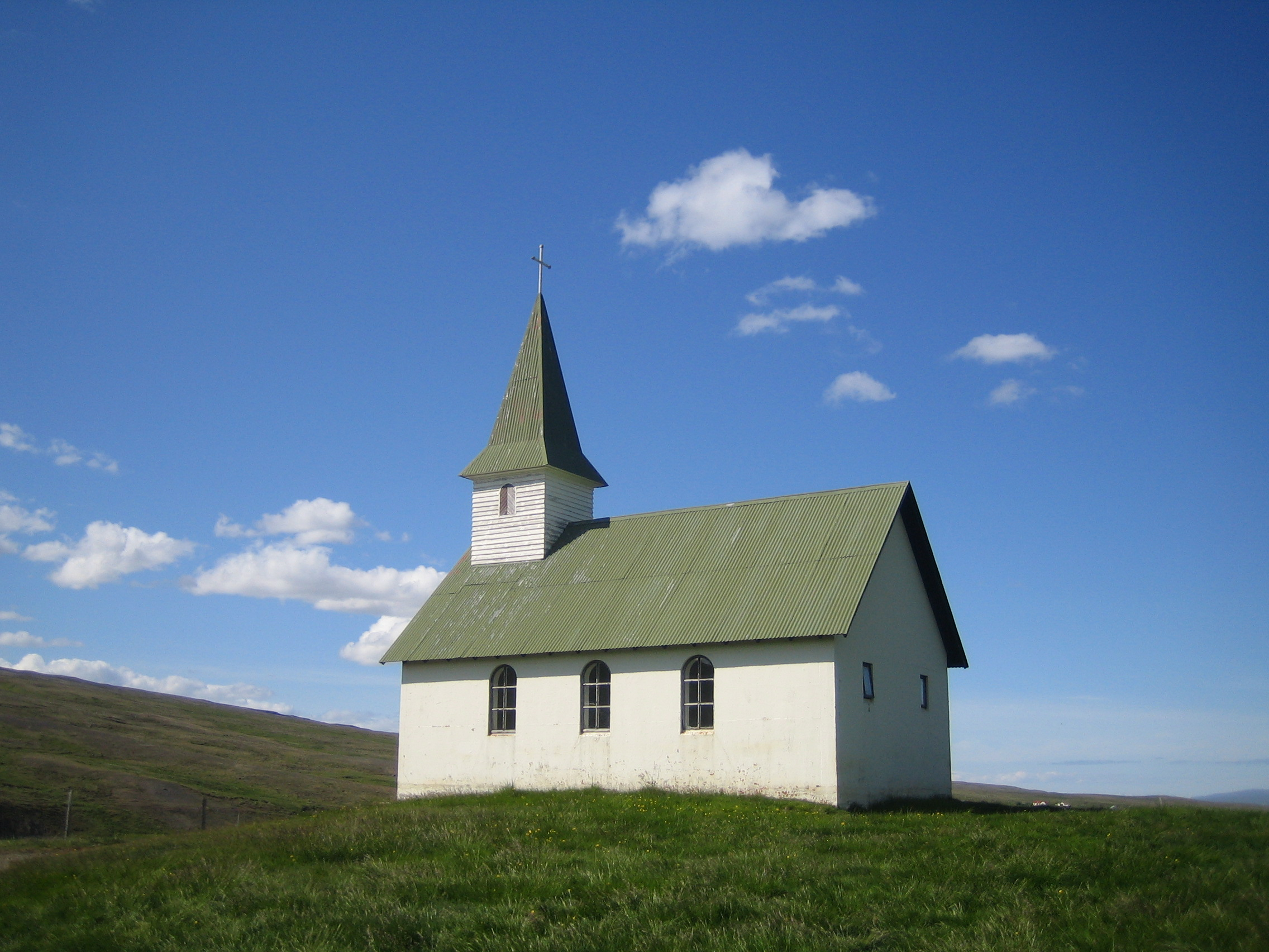 Efranúpskirkja í Miðfirði (Miðfjörður, Húnaflói)